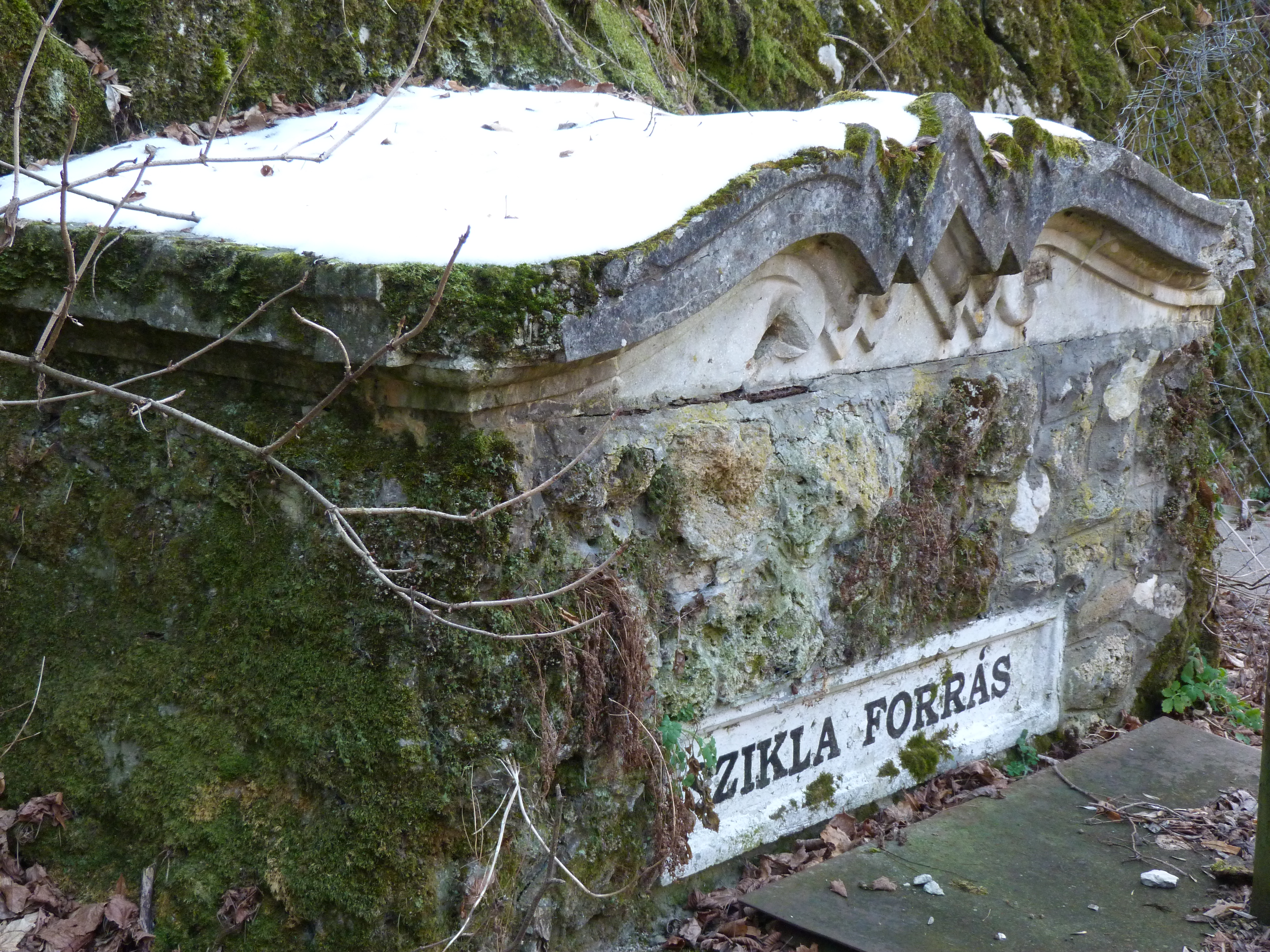 A felvétel 2014. február 5 én szerdán készült Felsőtárkányban. Szikla tó, Szikla forrás. ©© Derzsi Elekes Andor, Budapest, 2014, A kép és filmfelvételek egészben, vagy részletekben másolását, bármilyen úton történő sokszorosítását és felhasználását a szerző ellenérték nélkül, jogutódjaira is kihatóan megengedi. Az engedély kiterjed a kereskedelmi célú hasznosításra is. Kéri azonban nevének feltüntetését a felhasználás során. A Metapolisz sorozat valamennyi képe és filmje Creative Commons alatti valamint kereskedelmi - for profit - célra is felhasználható. Ajánlott hivatkozás: Derzsi Elekes Andor: Metapolisz DVD line